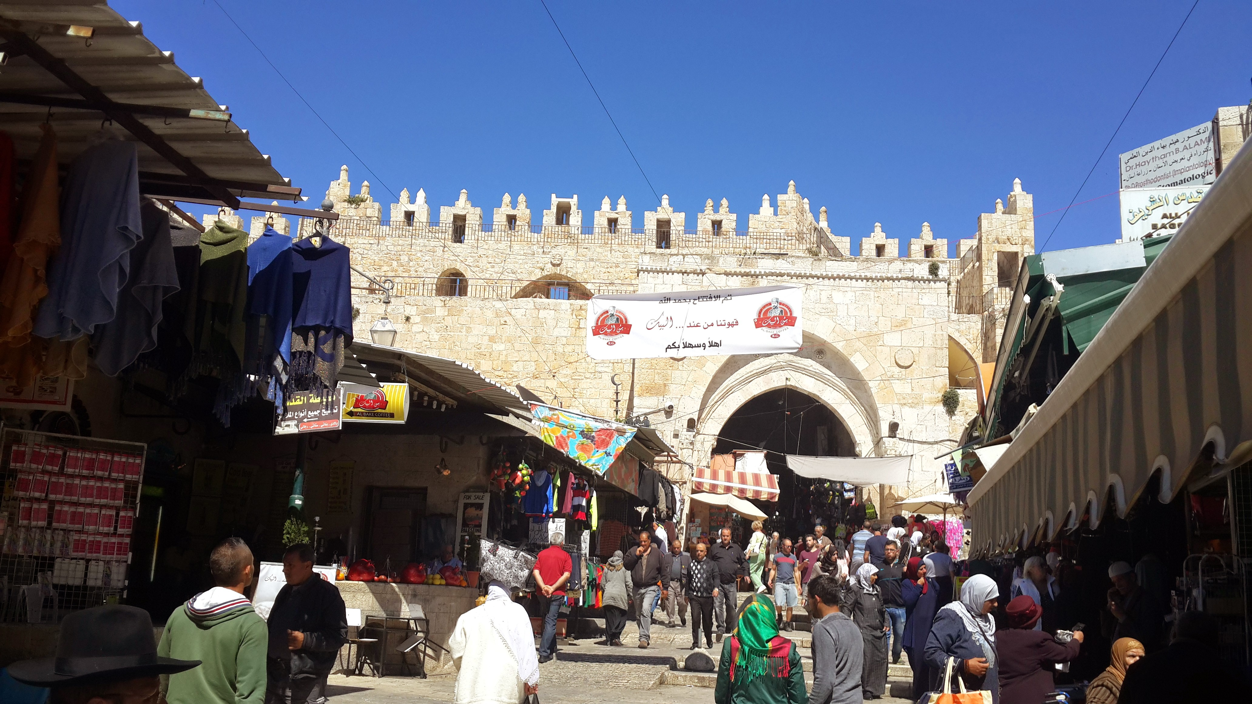 Старый Город в Иерусалиме. Шхемские ворота (изнутри)